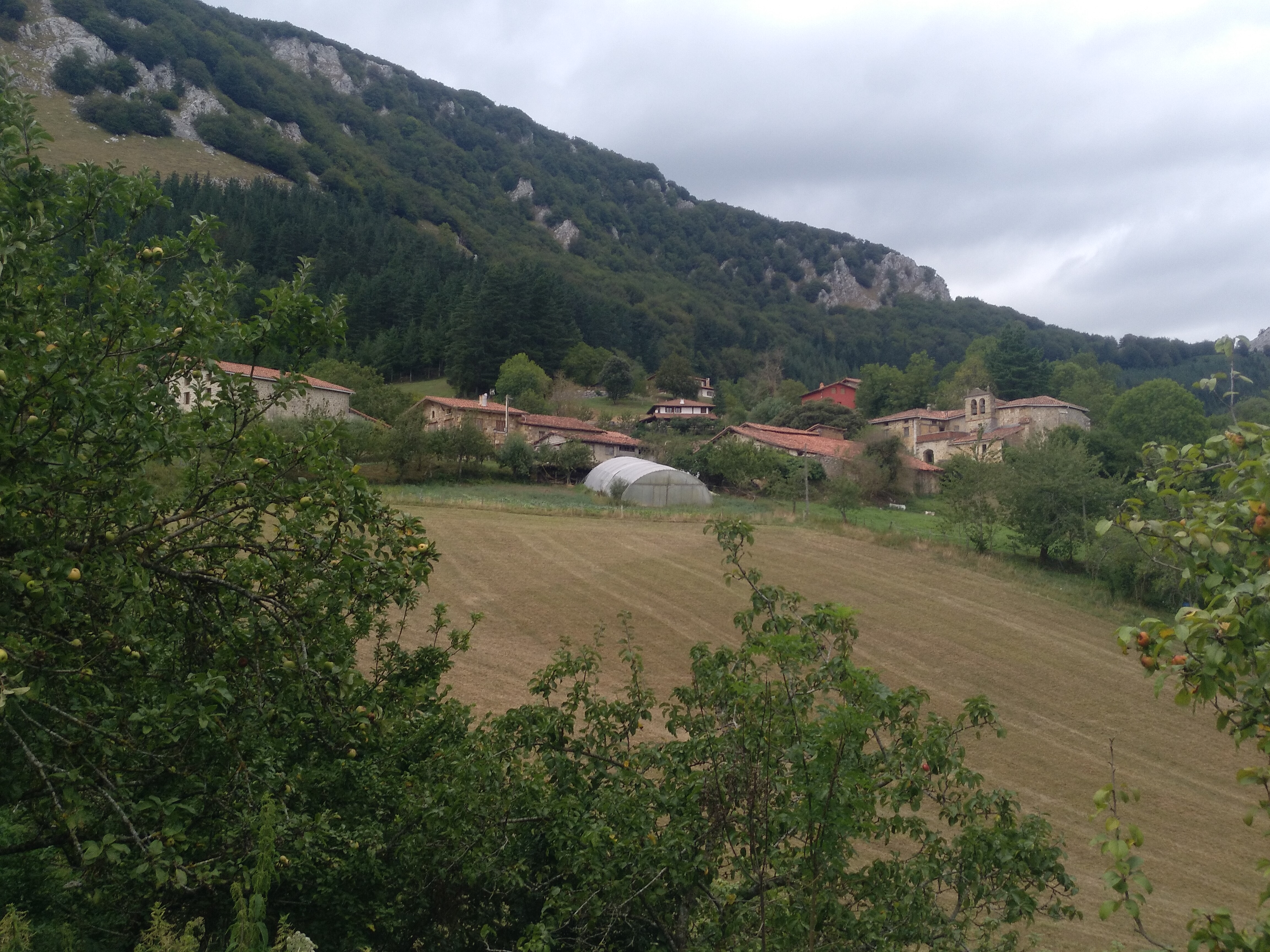 Etxaguen auzoa Aramaio udalerrian